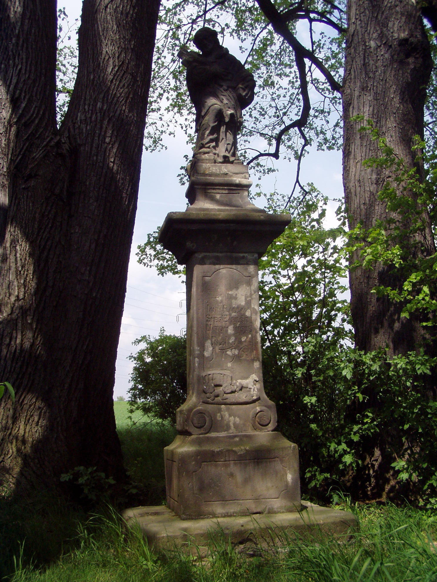 Socha Jana Nepomuckého u bývalé cesty z Turnova do Liberce připomínající tragickou smrt kočího Jana Radovského slovy: Iann Radow / Skeg Zabilse / Natom miste / Rokv / 1796 (Jan Radovskej zabil se roku 1796)